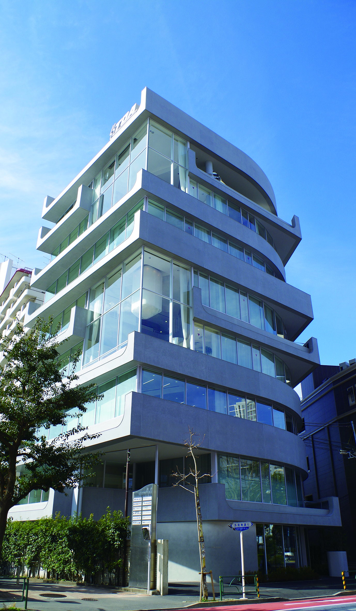 本社ビル（東京都港区六本木）